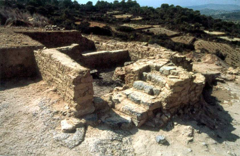 Arquitectura ibérica: casa ibérica con escaleras en el yacimiento de Castellet de Bernabé.